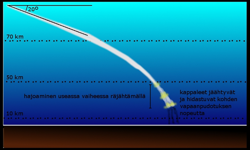 Tšeljabinskin asteroidin teoreettinen lentorata ja hajoaminen ilmakehässä.